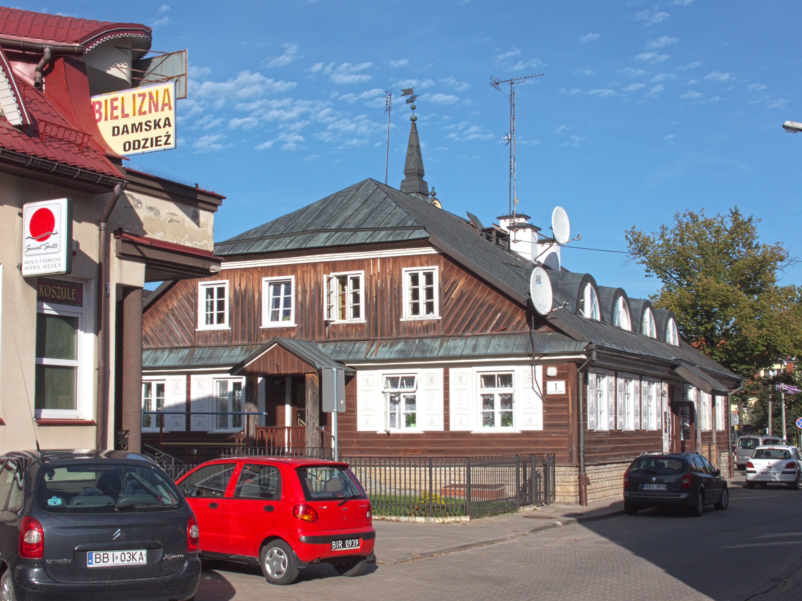 Dawna karczma "Słuszna" przy Placu Ratuszowym 1 w Bielsku Podlaskim